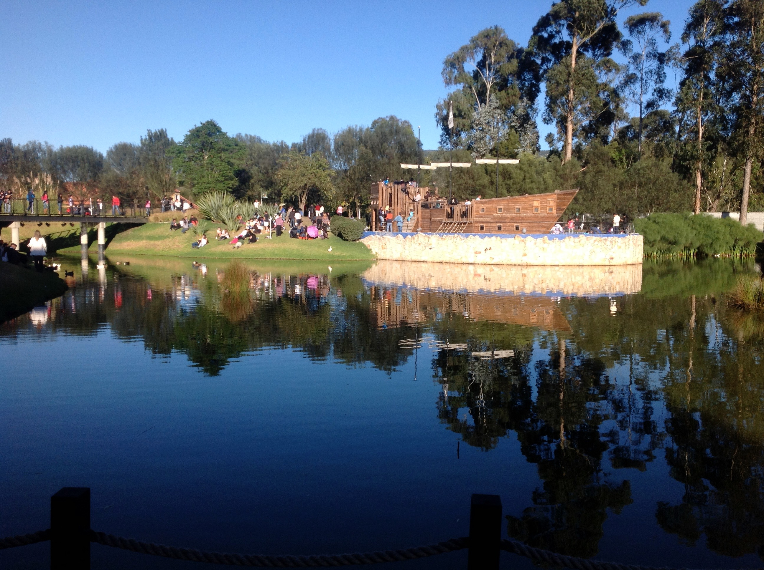 Centro comercial ubicado en el municipio de Chía, Cundinamarca. Esta fotografía fue tomada en el municipio colombiano con código 25175.